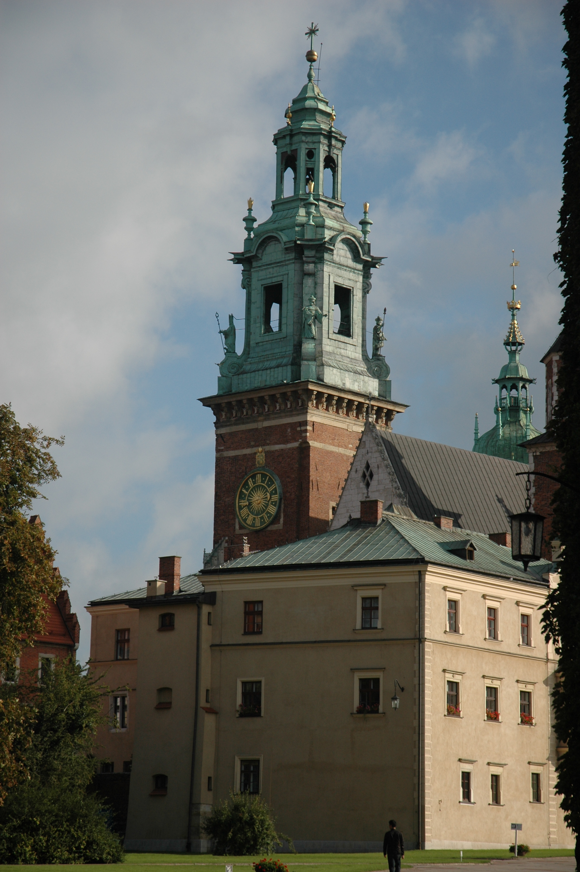 501俄羅斯冬宮博物館Russian Hermitage Museum